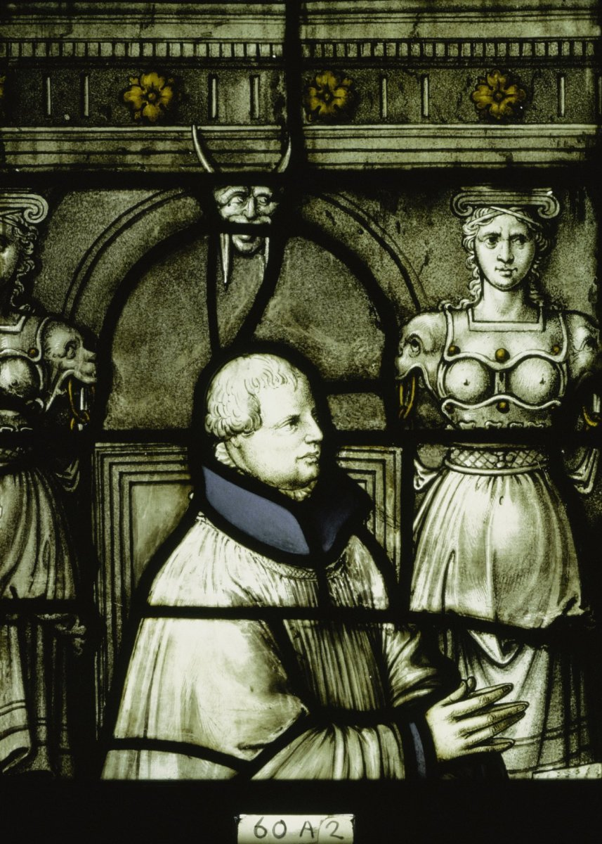 Sint Janskerk: interieur, glas in loodraam NR. 60, detail A 2